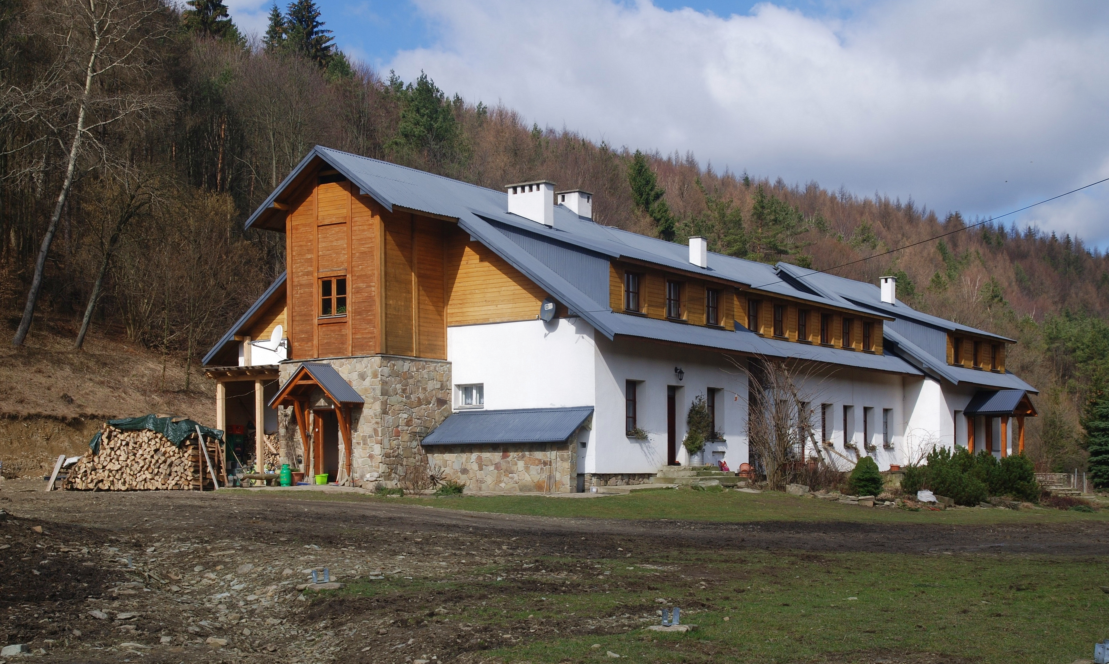 wieś Huta Polańska